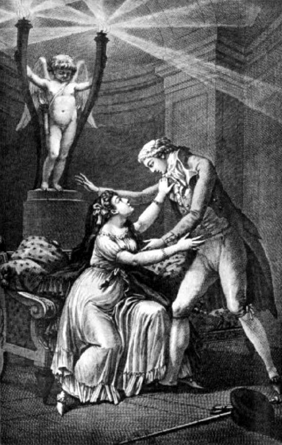 Illustration of Pierre Choderlos de Laclos' Dangerous Liaisons’ Letter 10 « O mon ami, lui dis-je… Pardonne-moi mes torts, je veux les expier à force d’amour »